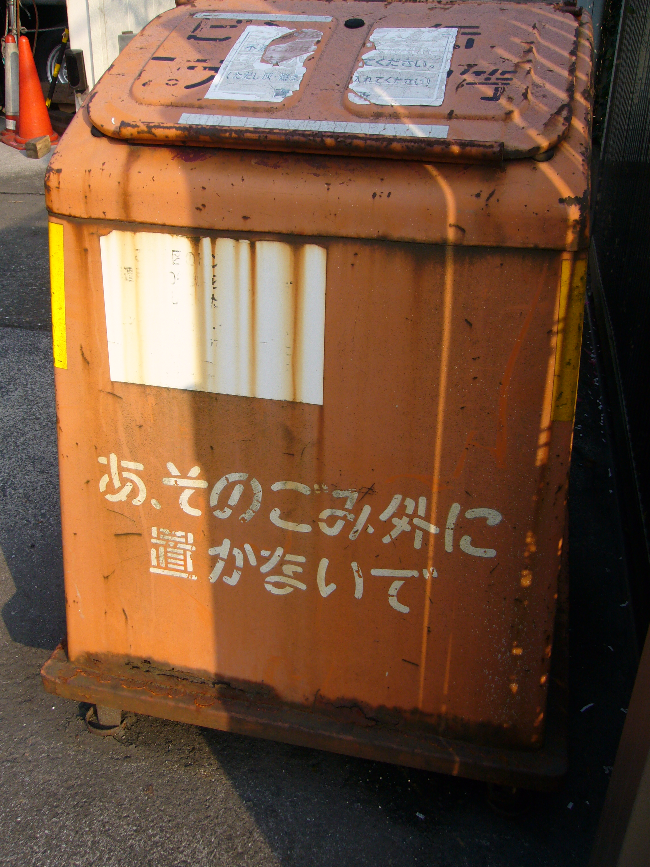 ゴミ集積ボックス あ、そのごみ外に置かないで